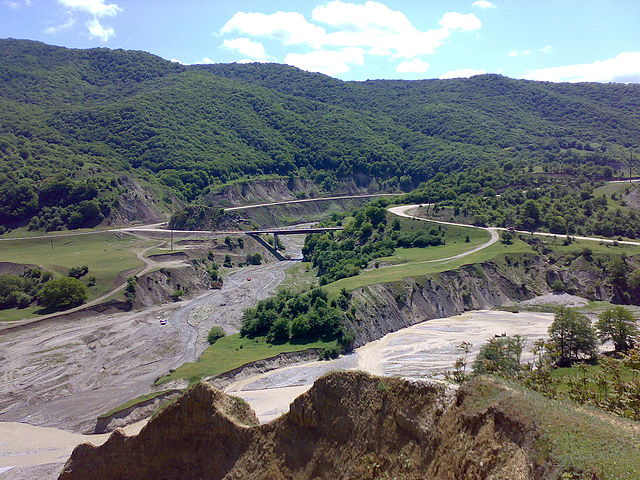 Нохчийн: ГӀурий а, Сал-хи а вовшахкхетар, аьтту агӀора ГӀурий, аьрру – Сал-хи